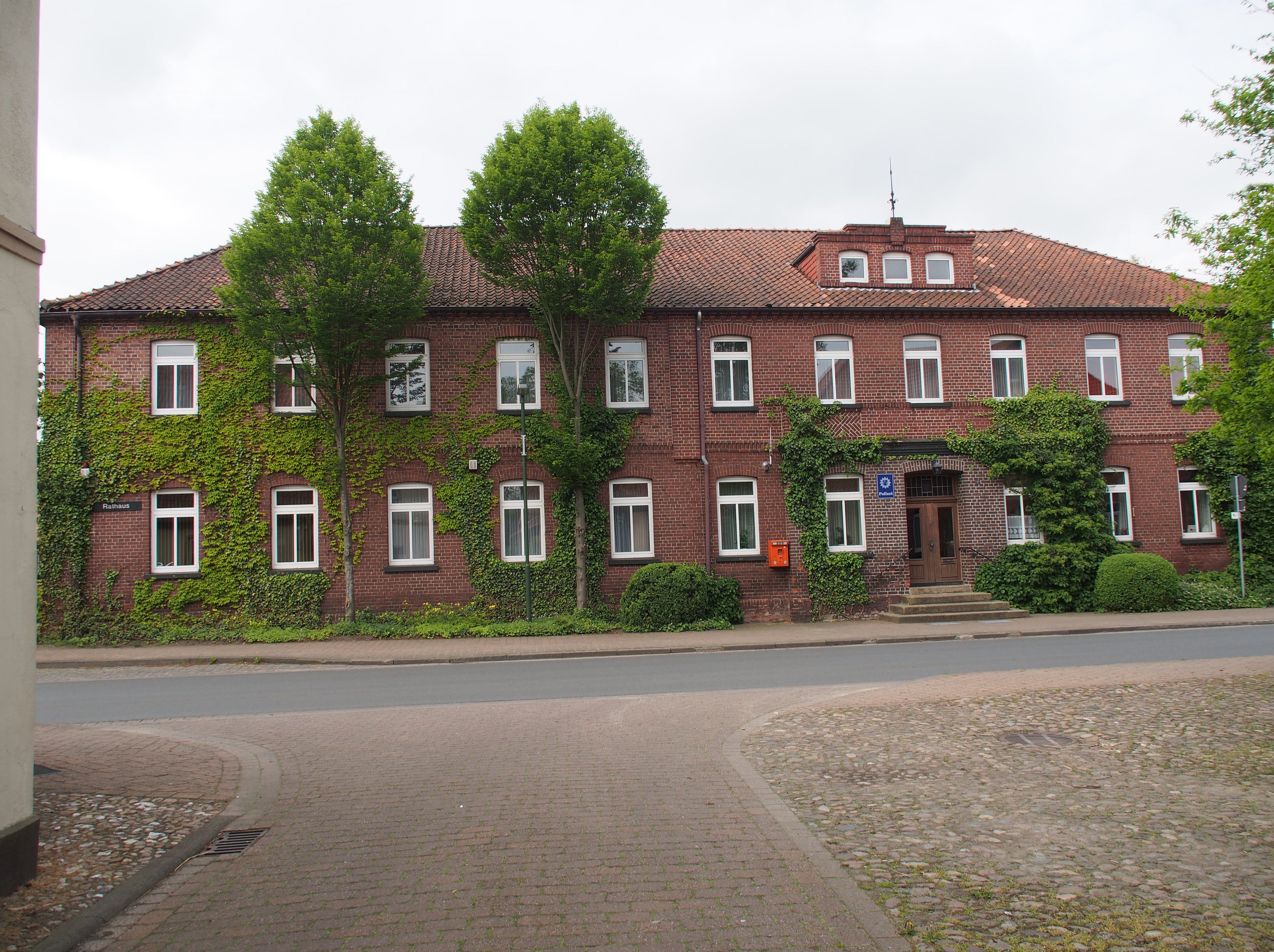 Rathaus von Wietzendorf, Landkreis Heidekreis, Lüneburger Heide